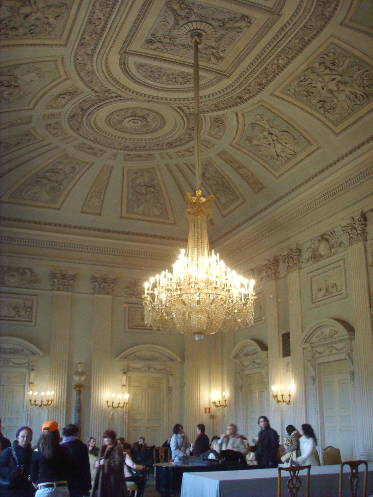 Villa_di_Poggio_Imperiale, salone_bianco